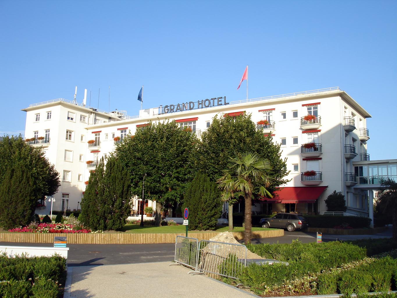 Le Grand Hôtel à Enghien-les-Bains (Val-d'Oise), France Juillet 2007 Photo personnelle (own work) de Clicsouris